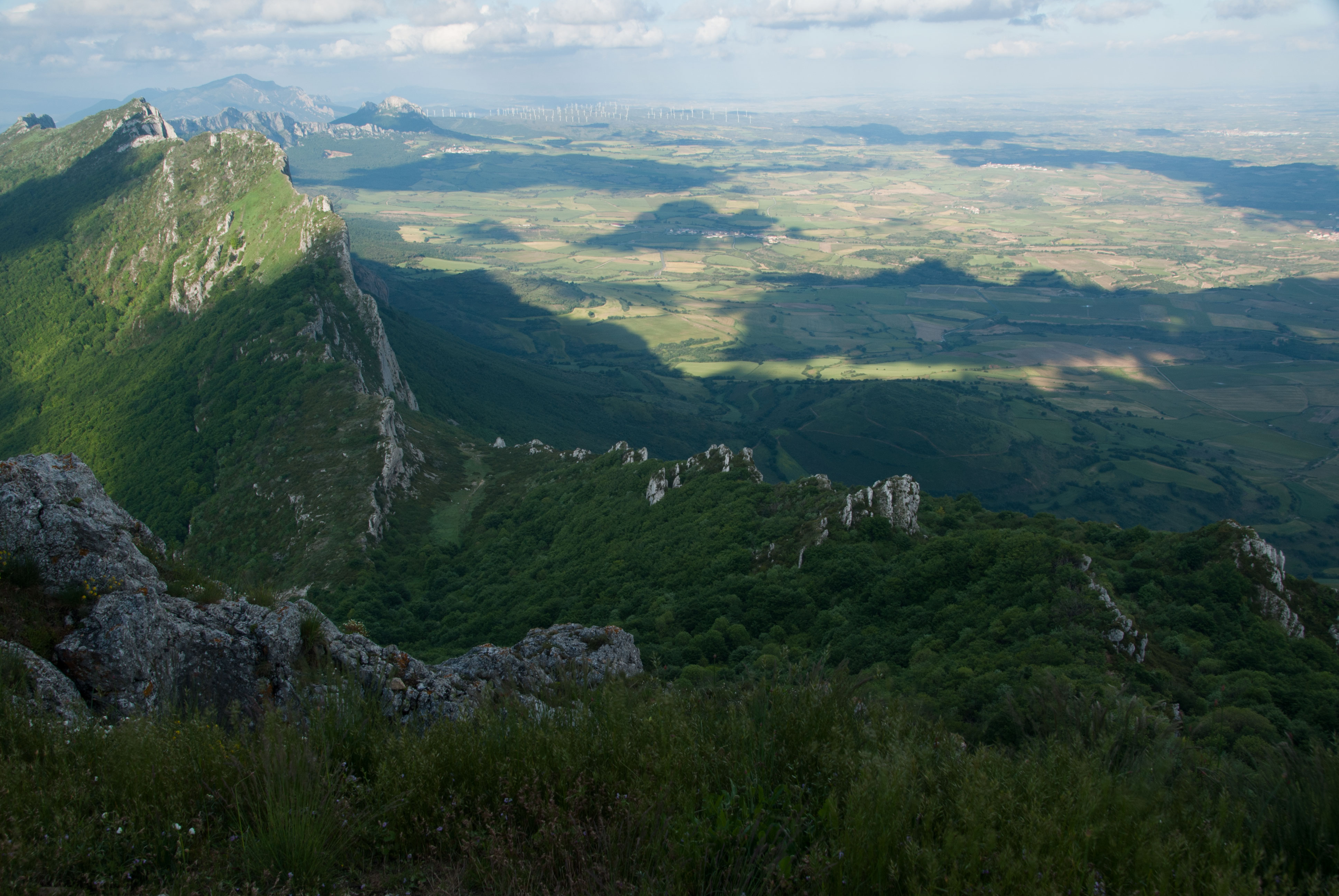 Vista hacia el este de la Sierra de Cantabria desde la cima de La Cruz del Castillo This is a photography of a Site of Community Importance in Spain with the ID: ES0000062. Natura2000 entry, EEA entry